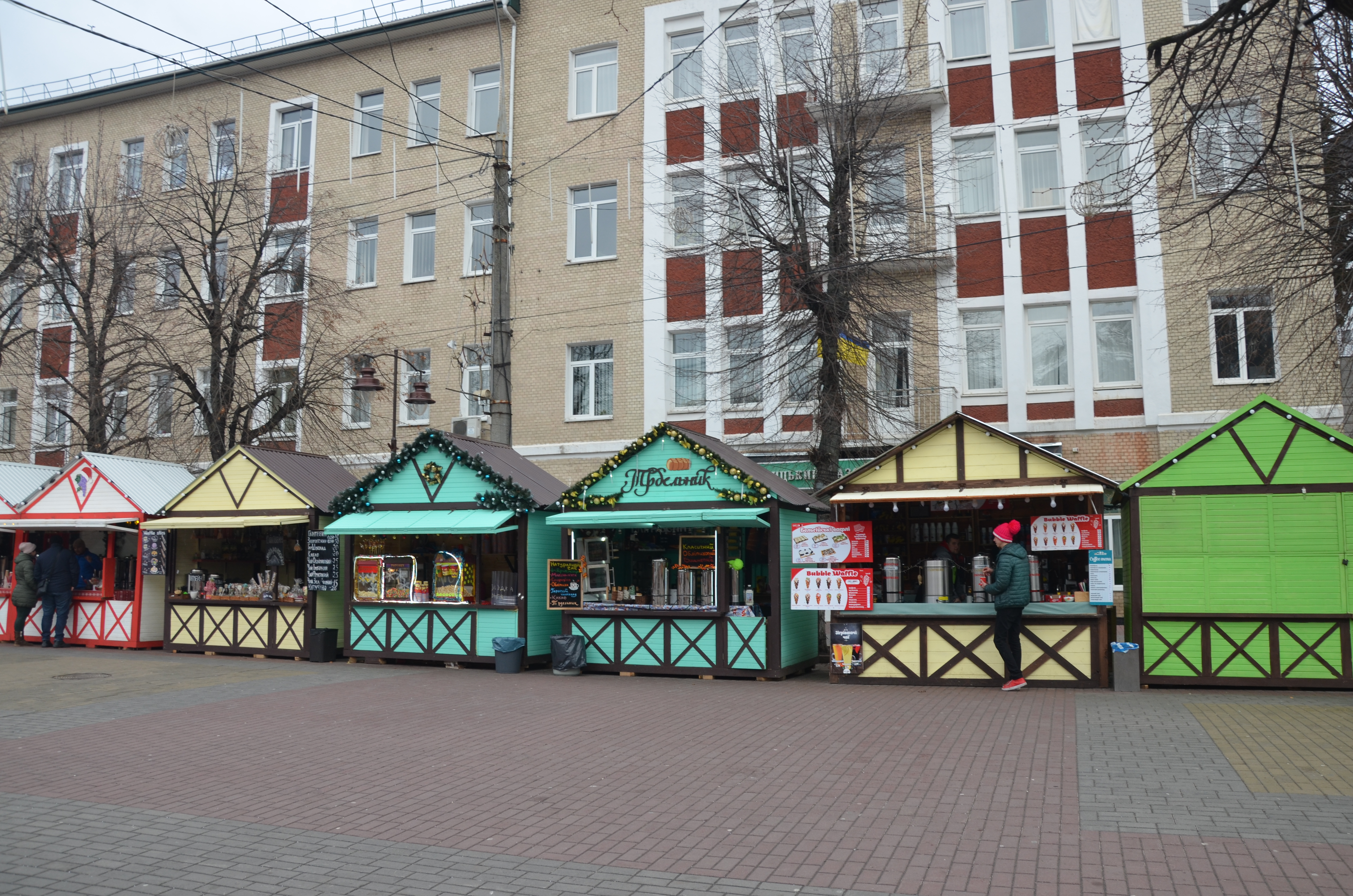 Різдво в Хмельницькому 2020 році, 13 січня.